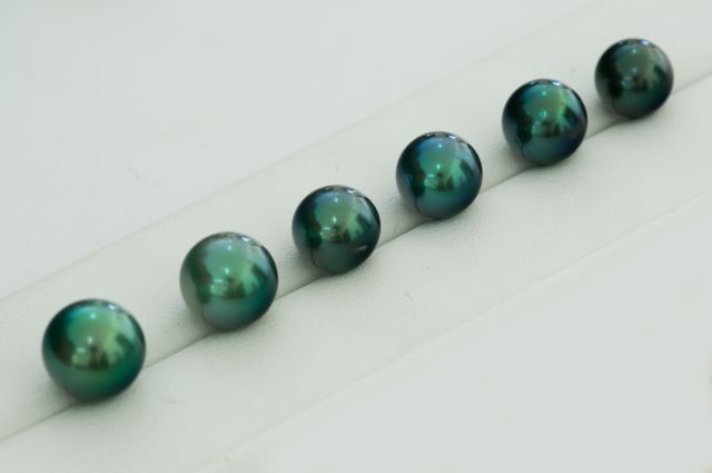 Perle de Tahiti de la ferme perlière de Rangiroa, Gauguin's Pearl